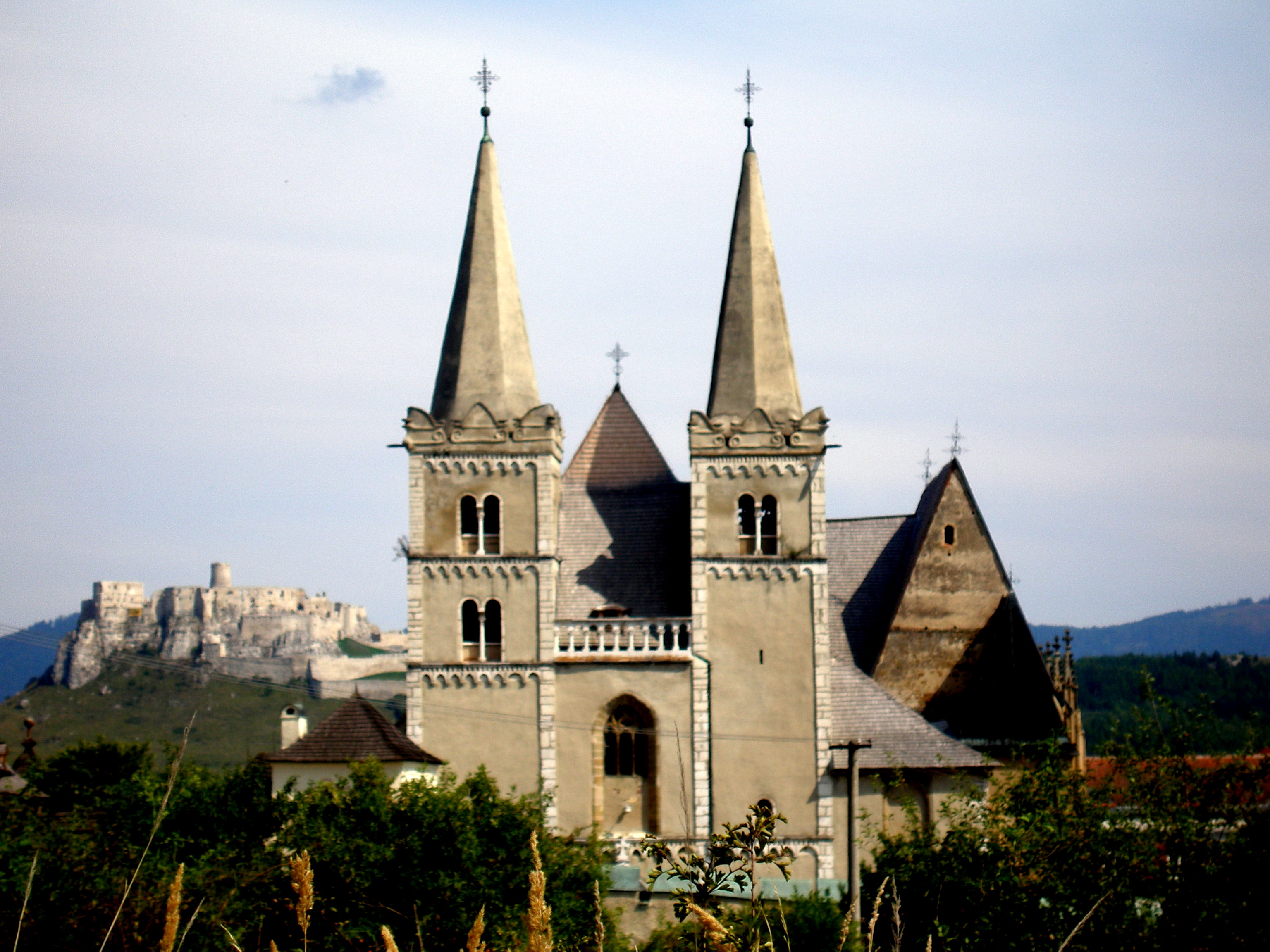 Spišská Kapitula a Spišský hrad, región Spiš